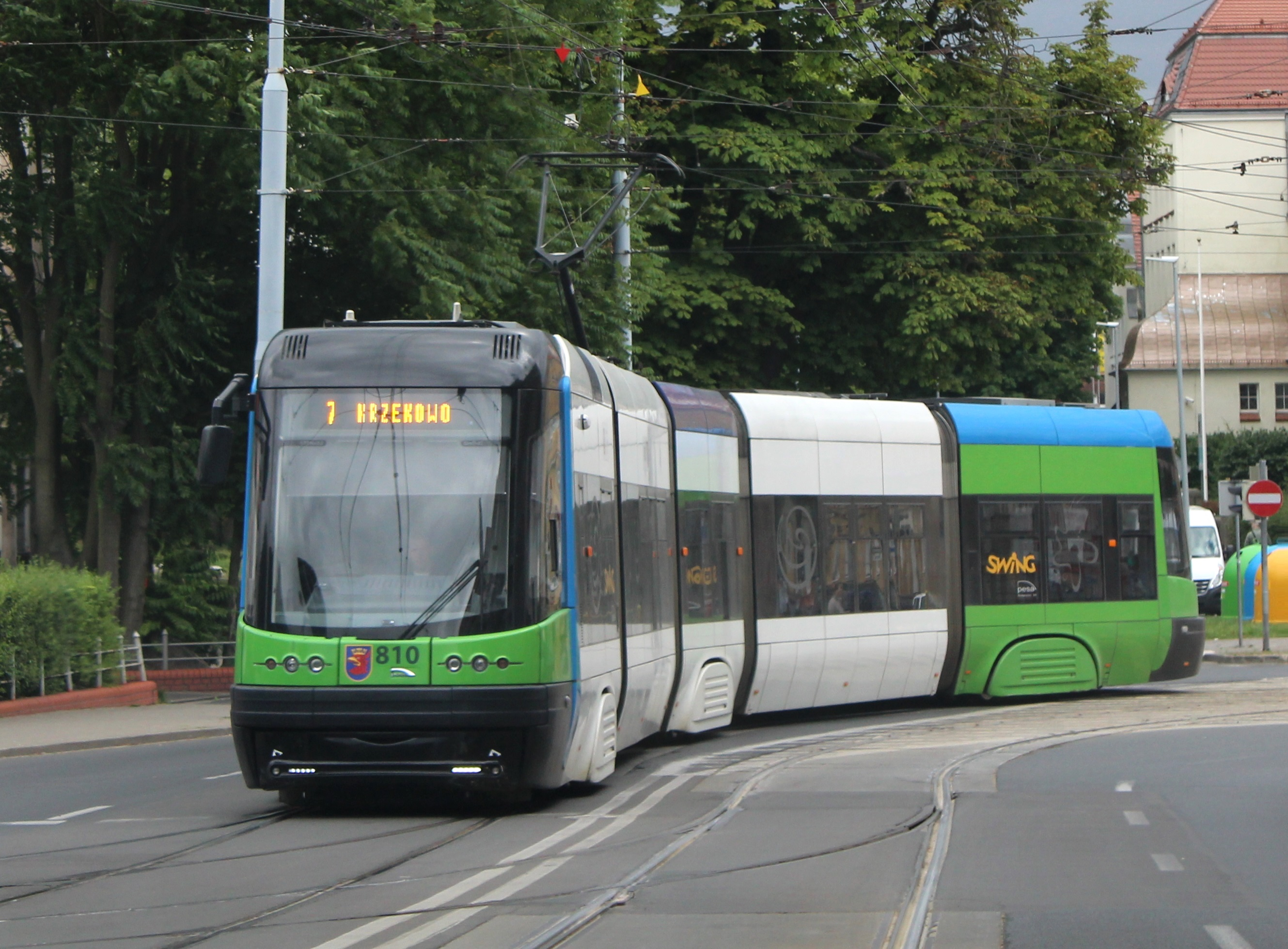 Tramwaj typu Pesa 120NaS w Szczecinie